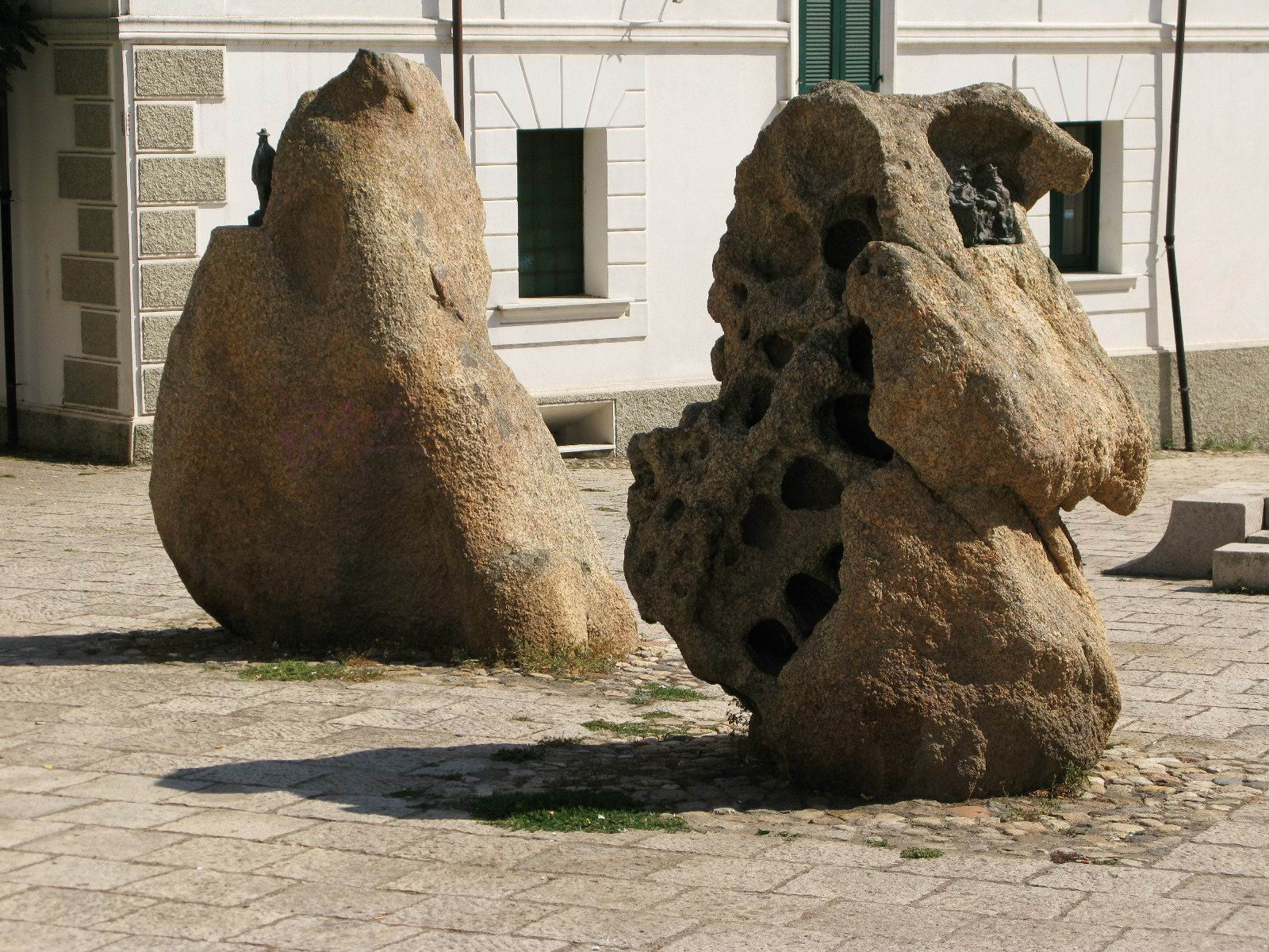 Piazza S. Satta a Nuoro - opere di Costantino Nivola